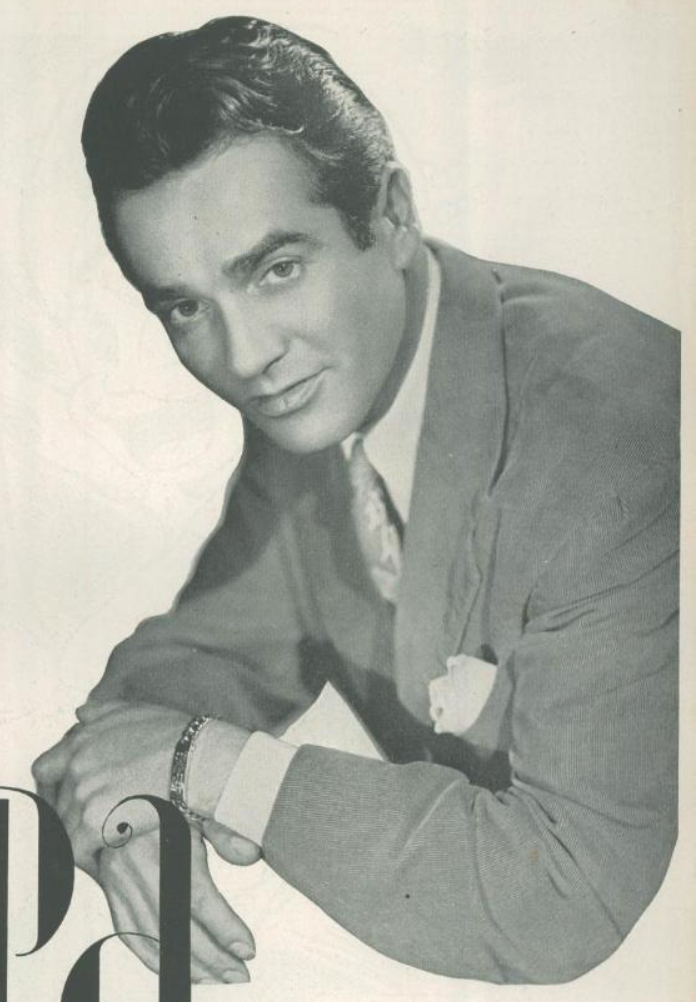 Gene Krupa